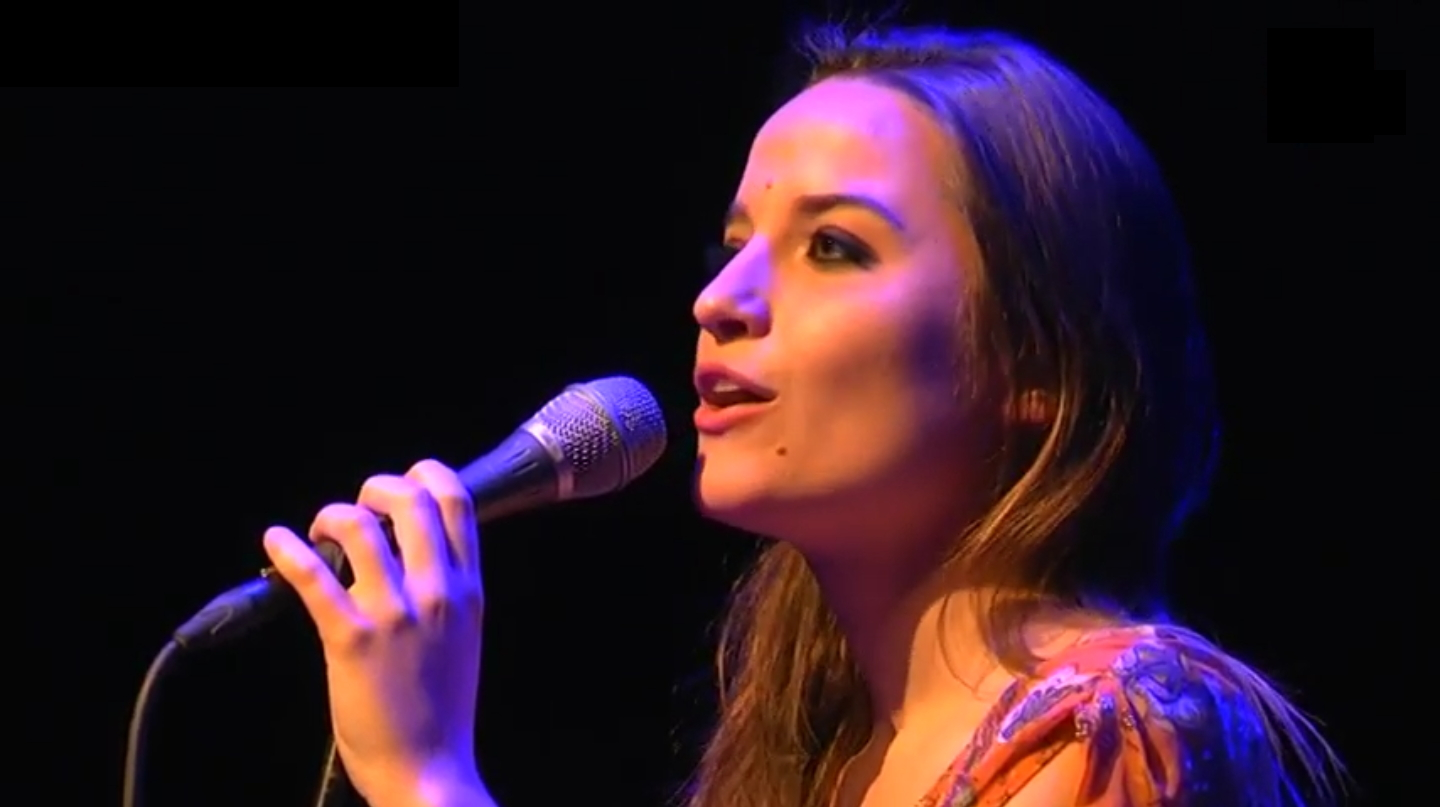 La cantant Judit Neddermann ha obert el festival, marcat pels 100 anys de l'Agrupació Coral Cardedeuenca. Neddermann ha presentat el seu primer disc en solitari.